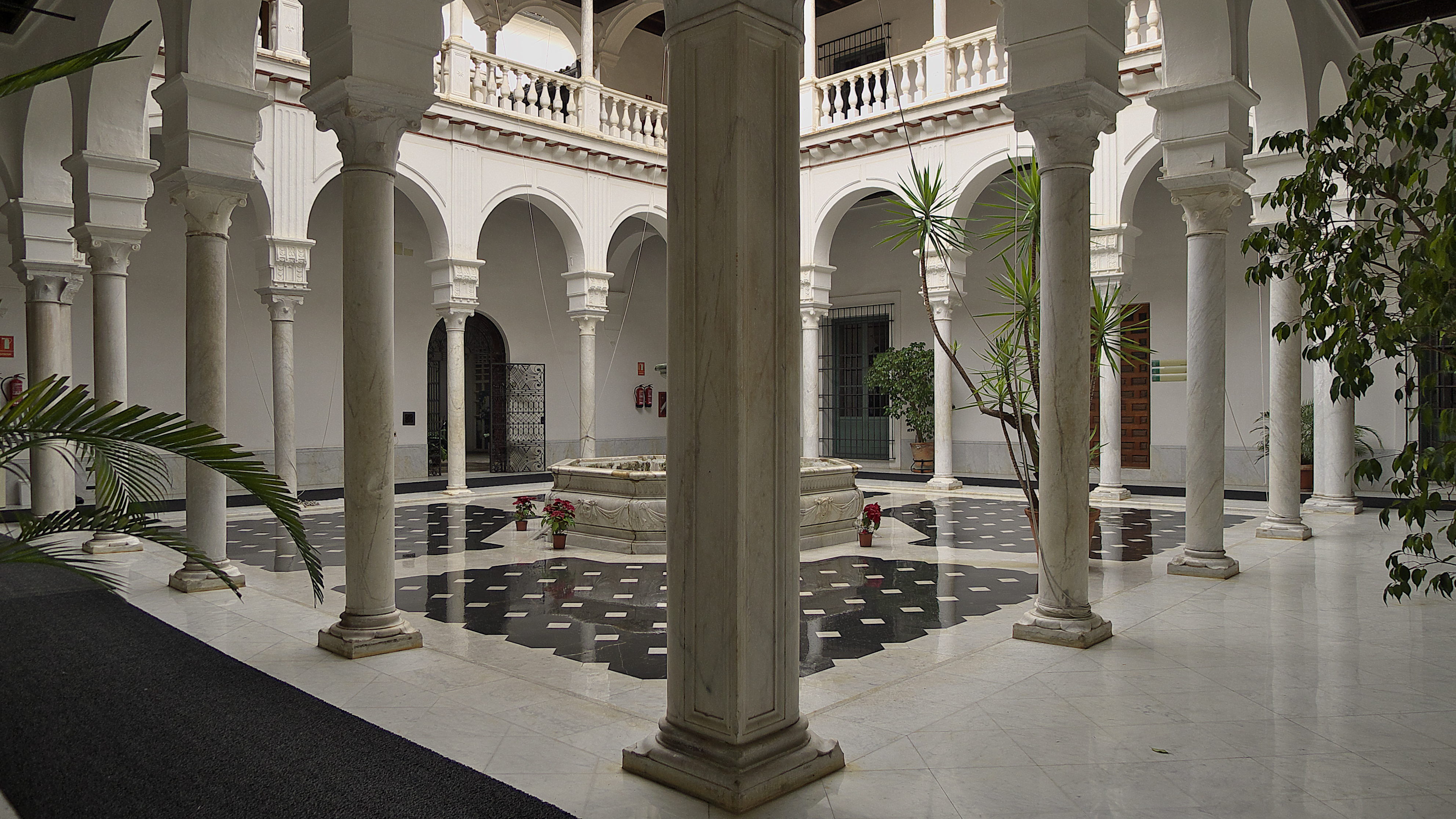 Juan de Almanza, Jurado de Sevilla, edifica su casa-palacio sobre unas casas mudéjares (1532). Antonio Aprile da Carona dirigirá la rehabilitación según los modelos renacentistas.